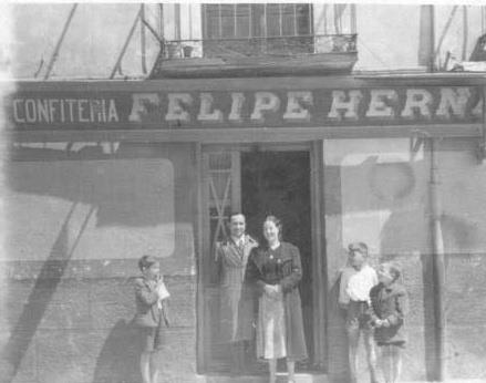 Felipe Hernández abrió su primer establecimiento de confitería con obrador en la Plaza del Caño Argales (Valladolid) en 1928.